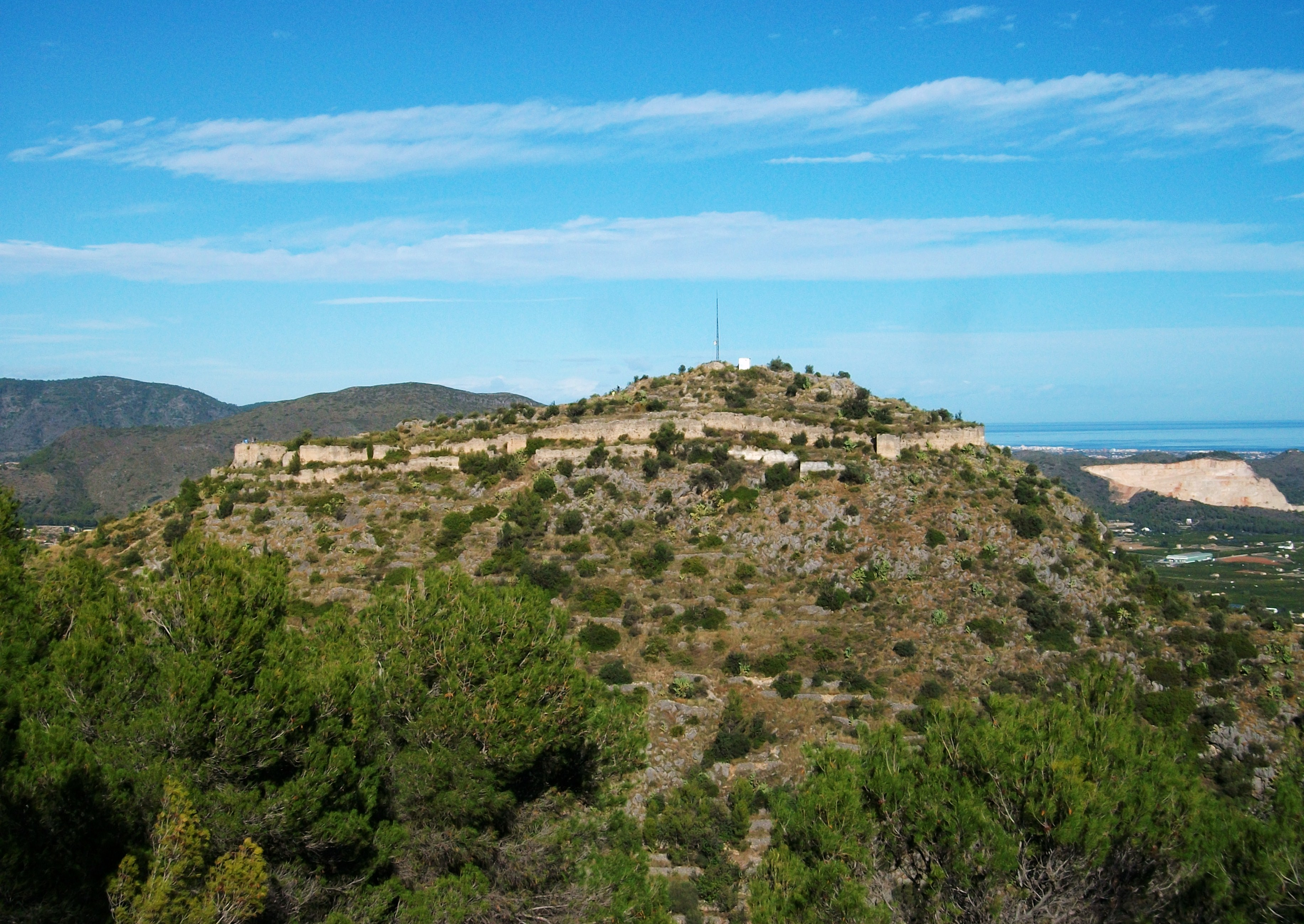 Castell d'Ambra a Pego, Marina Alta, País Valencià.